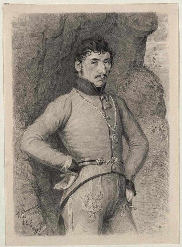 Josef Speckbacher (* 13. Juli 1767 in Gnadenwald, Tirol; † 28. März 1820 in Hall in Tirol), Tiroler Freiheitskämpfer